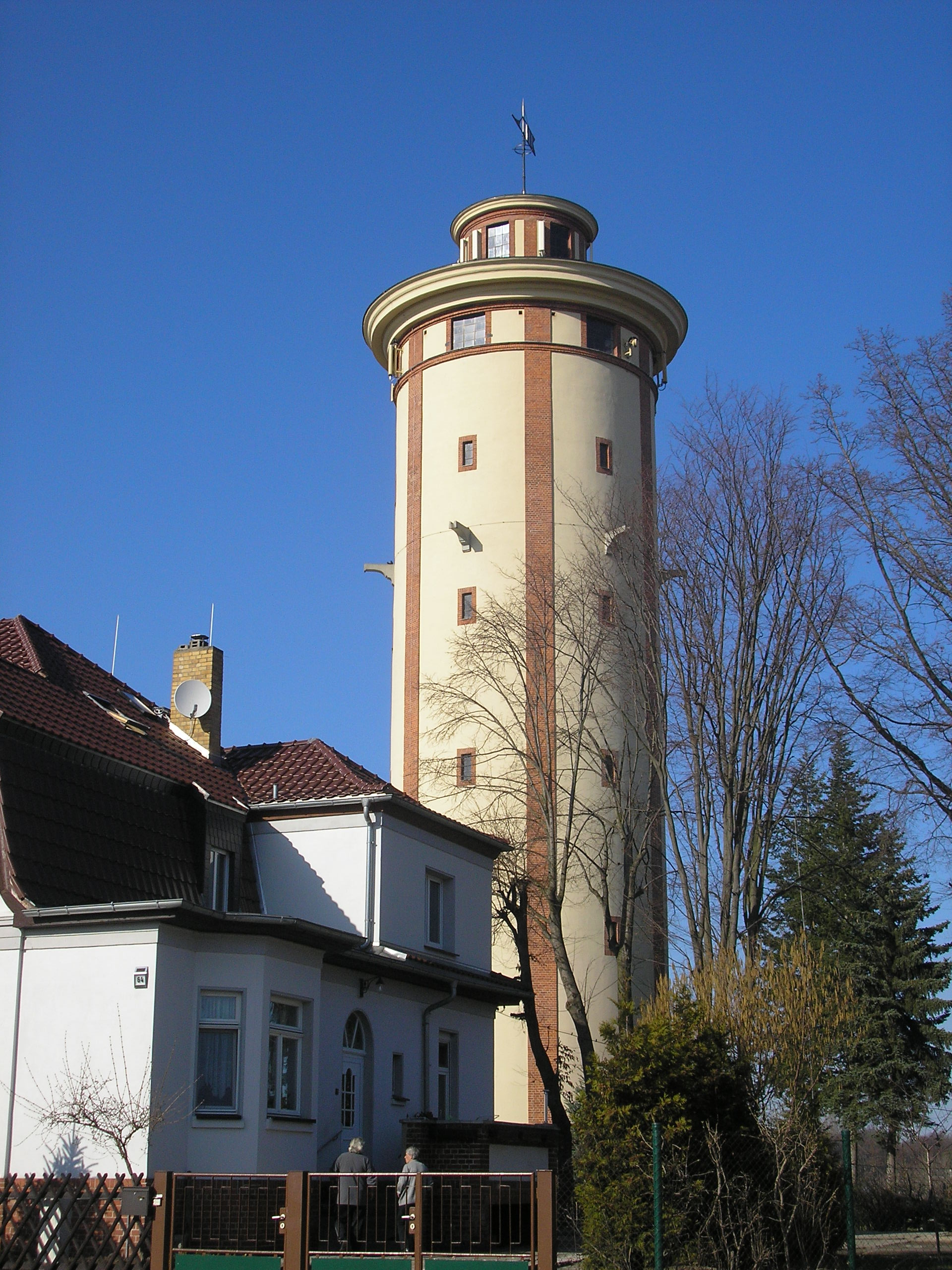 Der Wasserturm in Rositz (Thüringen).